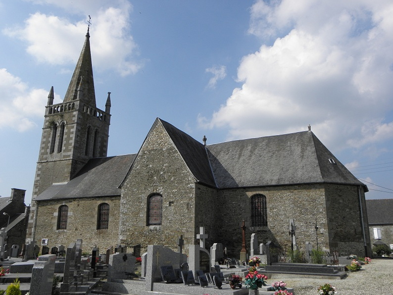 Église paroissiale de Vergoncey (50).